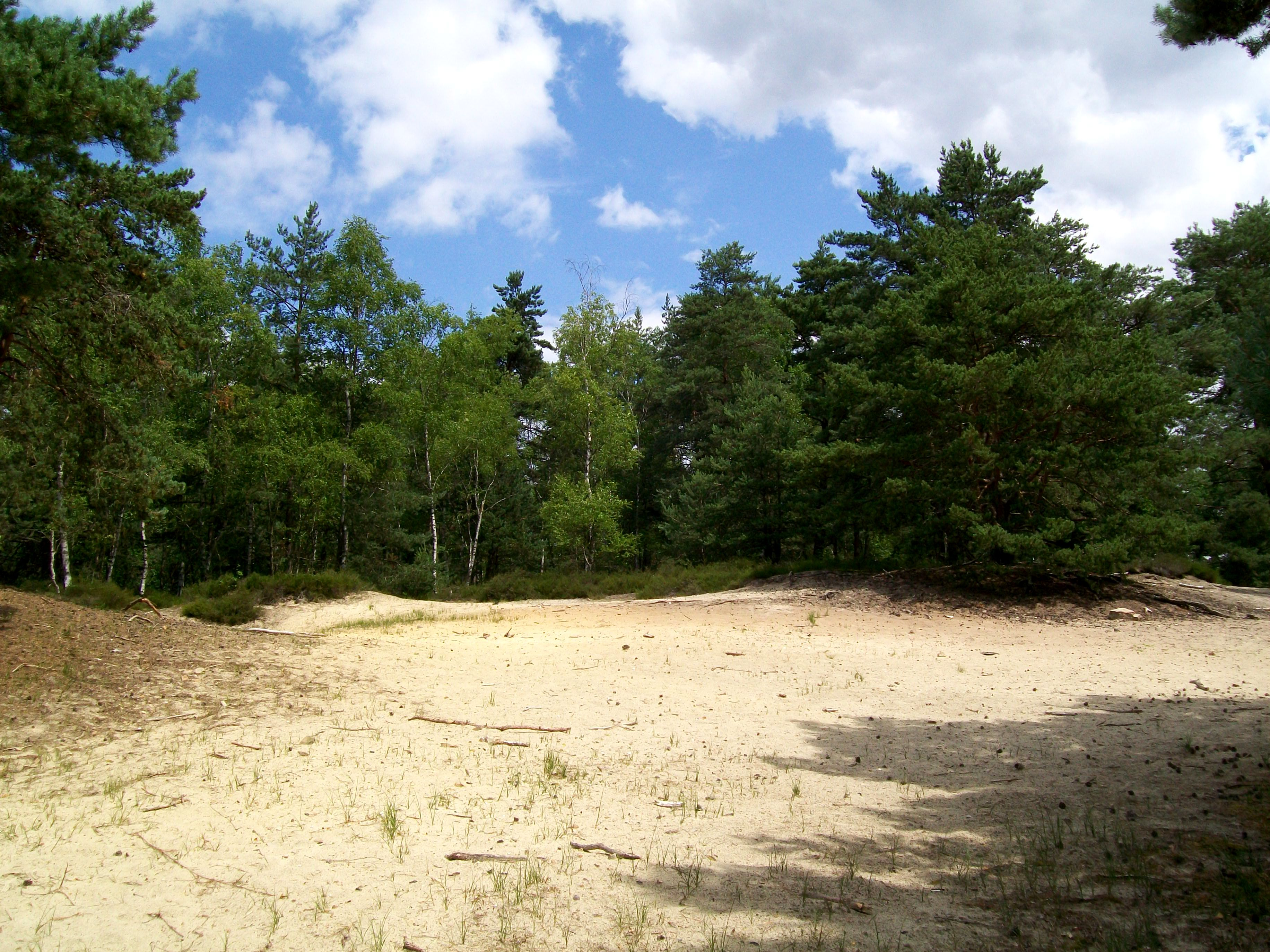 Le Trou de Sable, près de Thiers-sur-Thève ; c'est une ancienne carrière de sable.